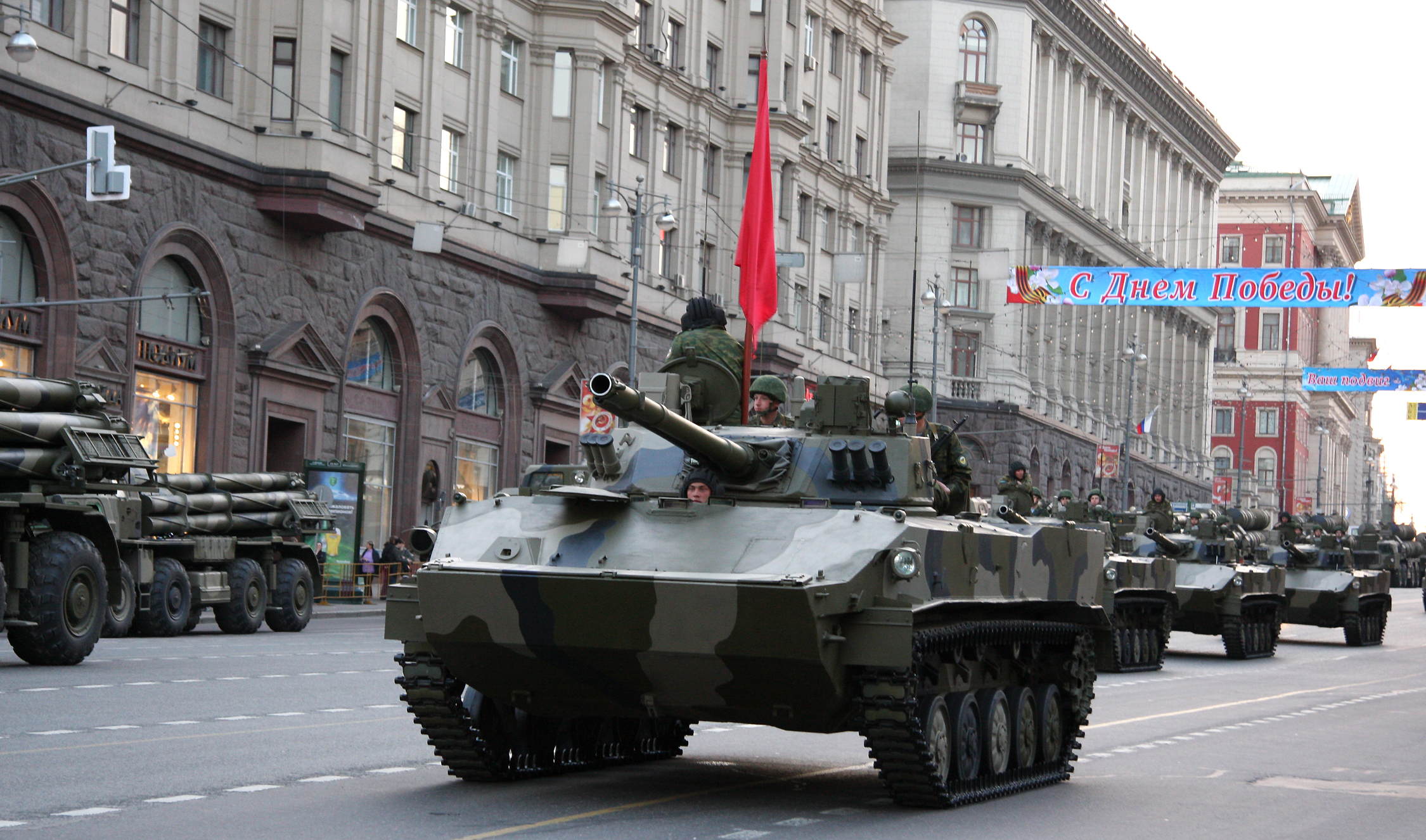 БМД-4